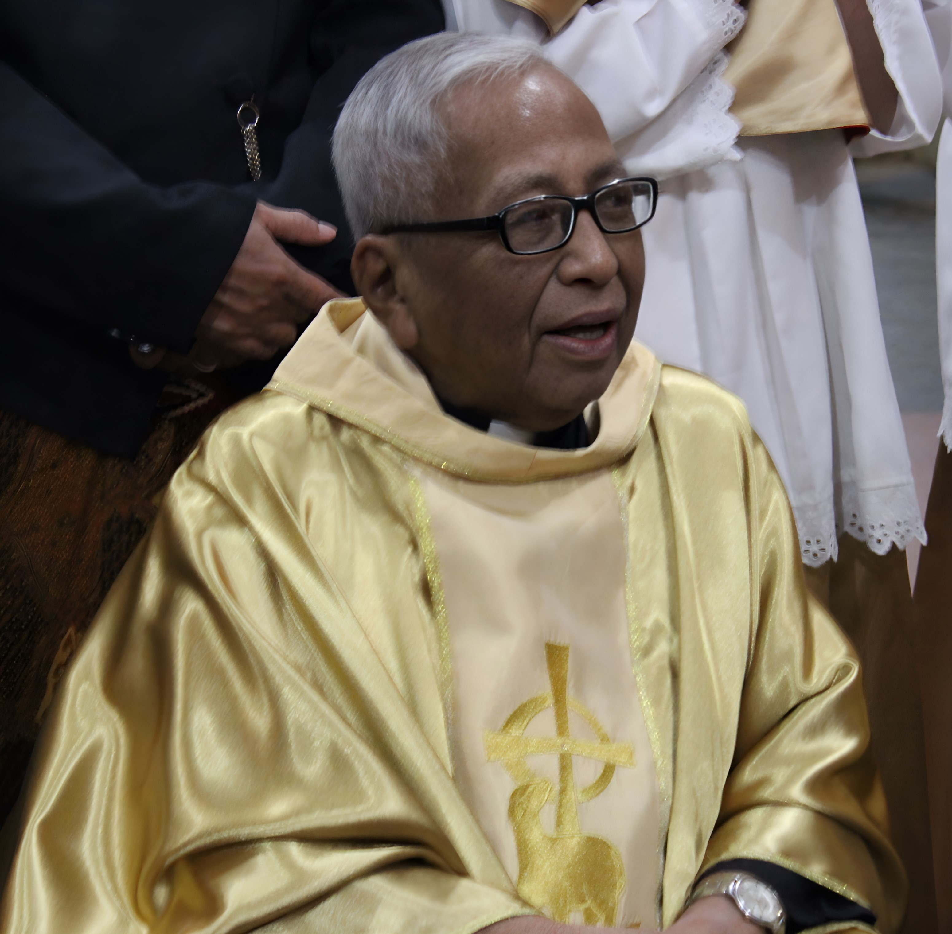 Uskup Agung Emeritus Banjarmasin, Mgr. Fransiskus Xaverius Rocharjanta Prajasuta